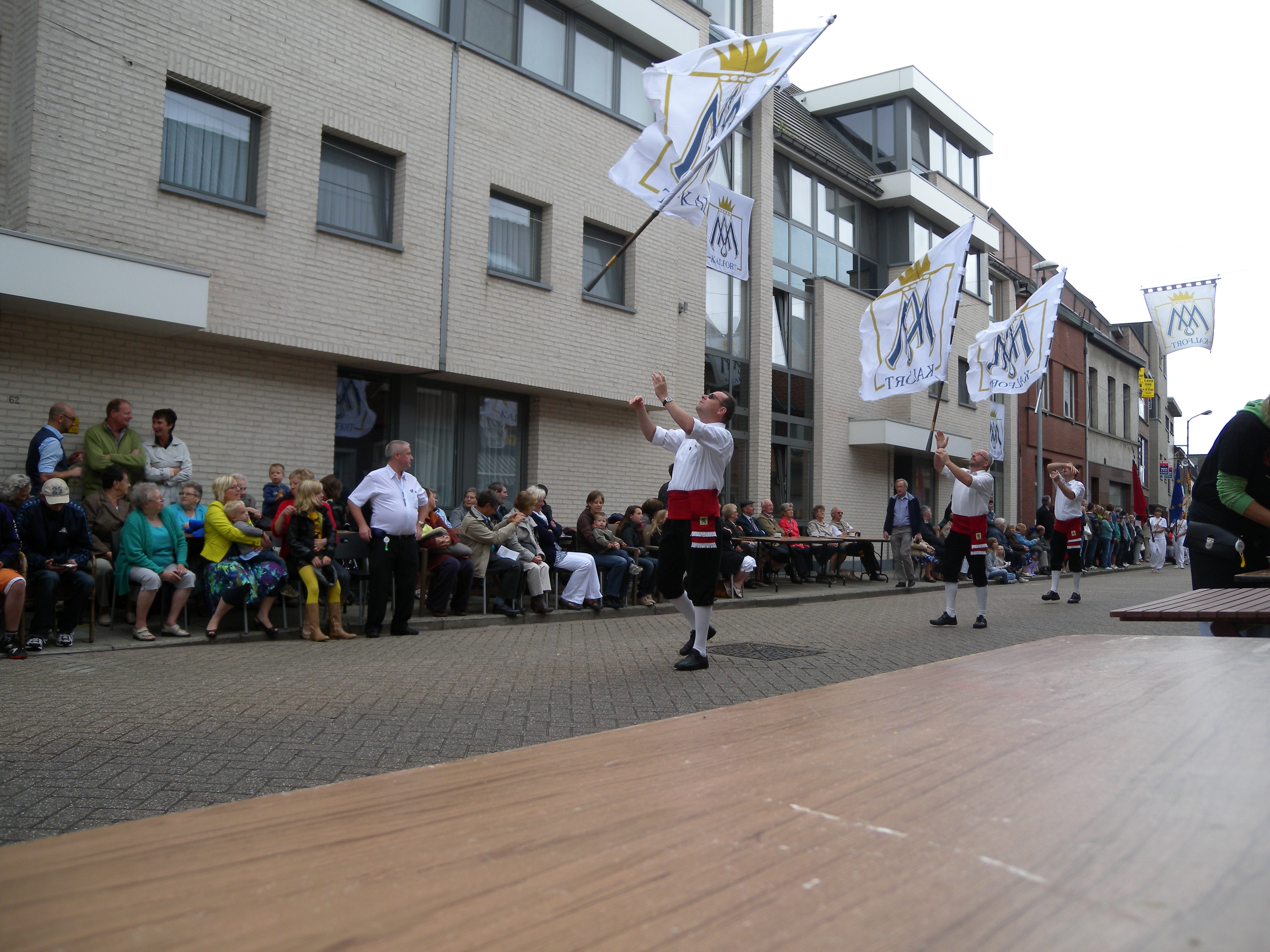 Vlaggendragers met de Kalfortse (Maria-ommegang) vlag tijdens de ommegang van 2011.